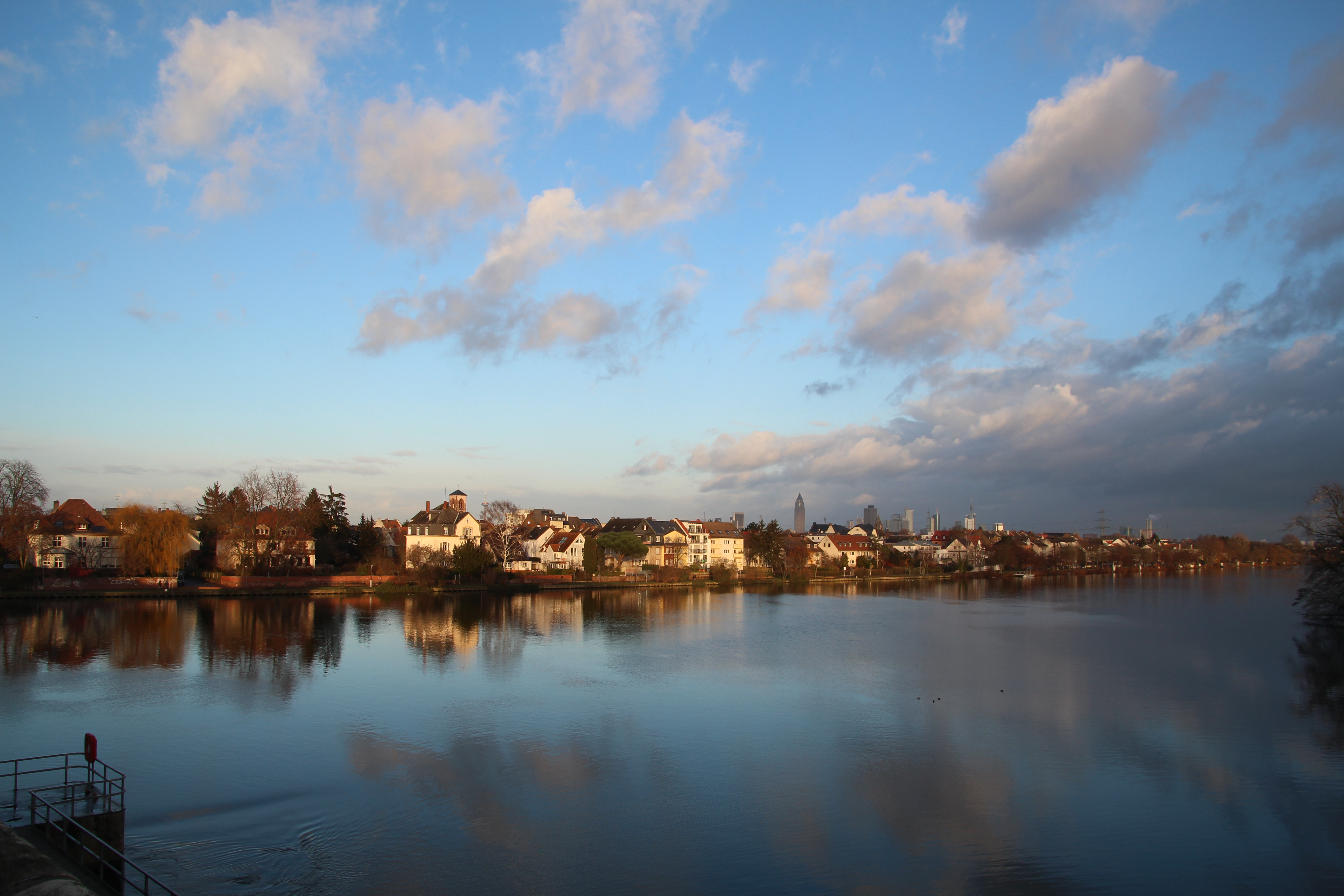 Siehe Bild und Dateiname